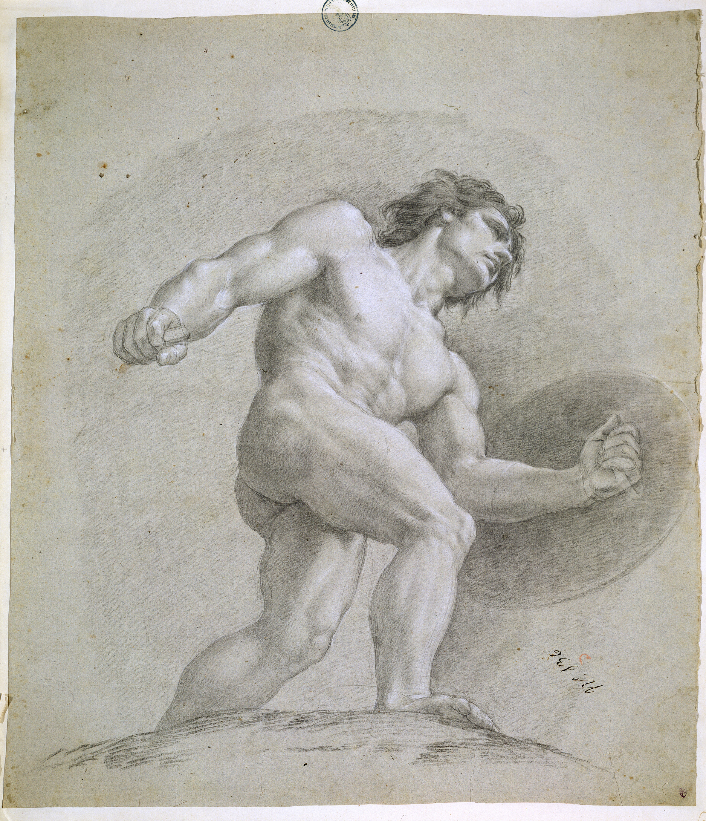 Dibujo de Marte, dios de la guerra, preparatorio para El Olimpo: batalla con los gigantes Boceto realizado como preparación para el fresco del techo de la antecámara del cuarto de los Príncipes de Asturias del Palacio Real de Madrid.